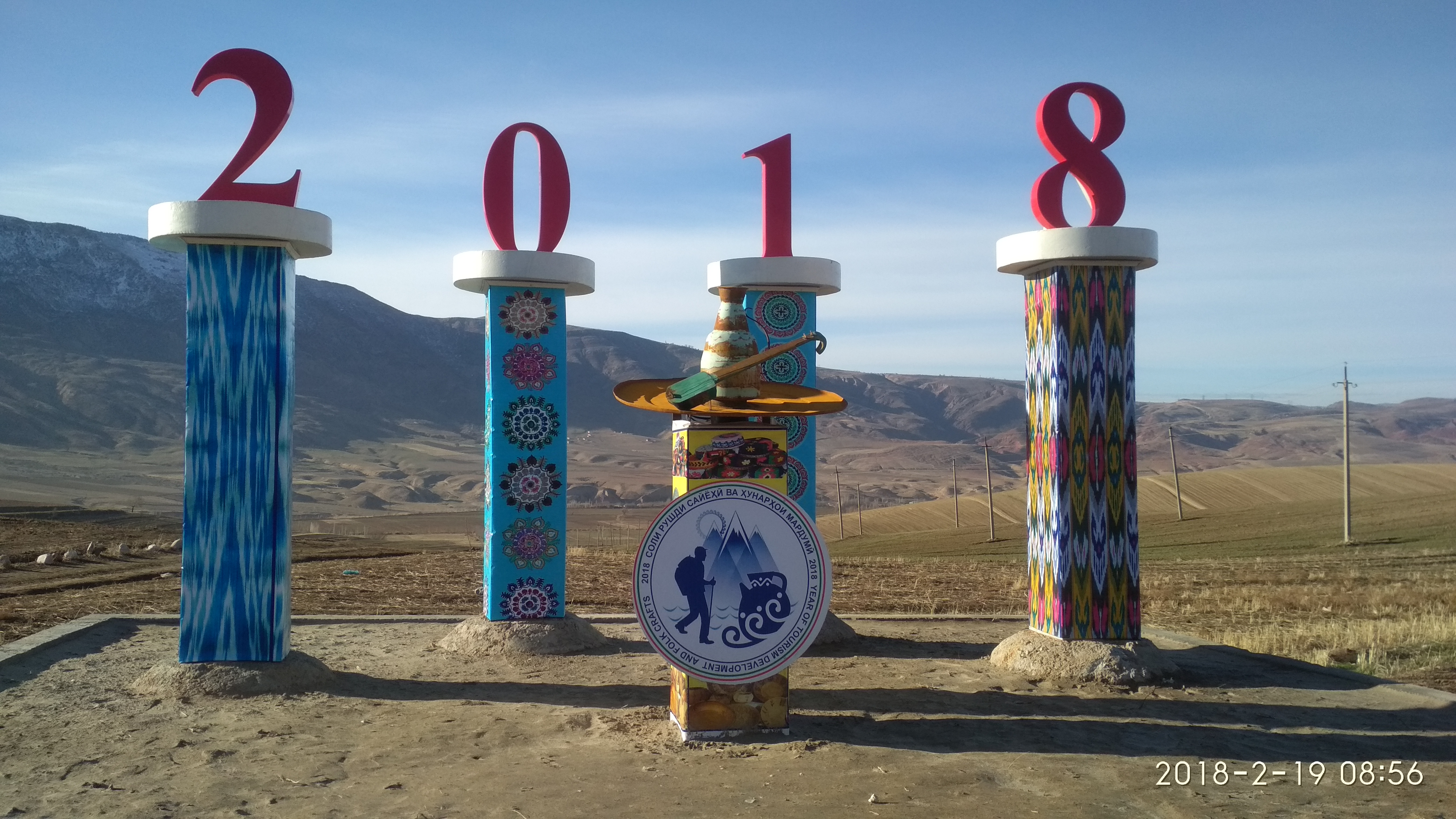 Тоҷикӣ: Соли рушди сайёҳӣ ва ҳунарҳои мардумӣ